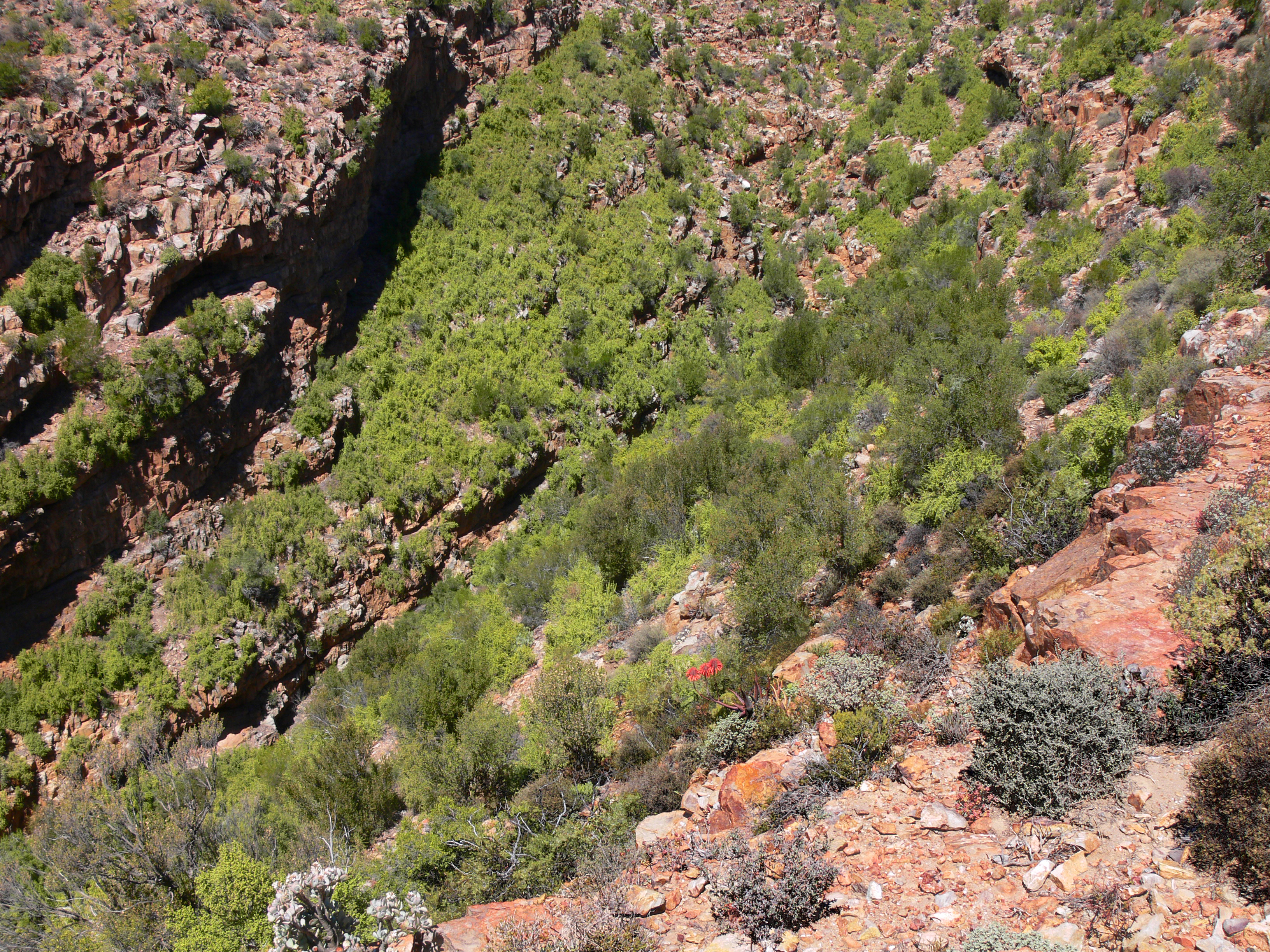 Gamkaberg Nature Reserve, kleine Karoo, Westkap, Südafrika